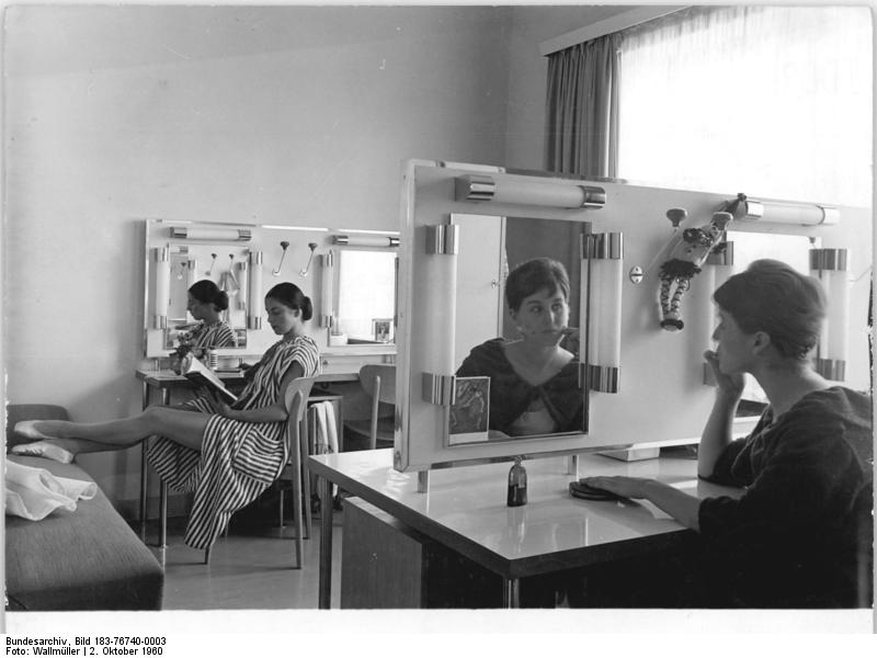 Leipzig, Opernhaus, Balettgarderobe Zentralbild Wallmüller FS-Fr 2.10.1960 Vor der Eröffnung der neuen Leipziger Oper Ein bedeutendes kulturelles Ereignis ist die feierliche Eröffnung des neuen Leipziger Opernhauses zum 11. Jahrestag der Deutschen Demokratischen Republik am 7.10.1960. Das neuerbaute Haus ist nach den modernsten bühnentechnischen Gesichtspunkten ausgestattet. UBz: Die Ballettsolistinnen Ursula CAIN und Brigitta SINON in der freundlichen und komfortablen Ballettgarderobe.